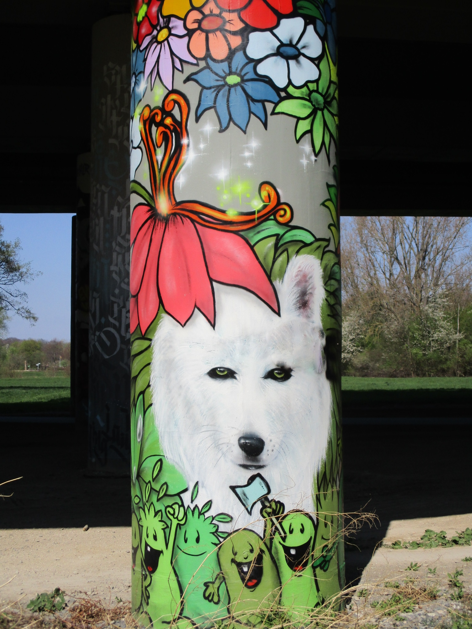 Graffiti an den Säulen der Brücke der A 66 im Niddapark Frankfurt, zwischen Hausen und Bockenheim